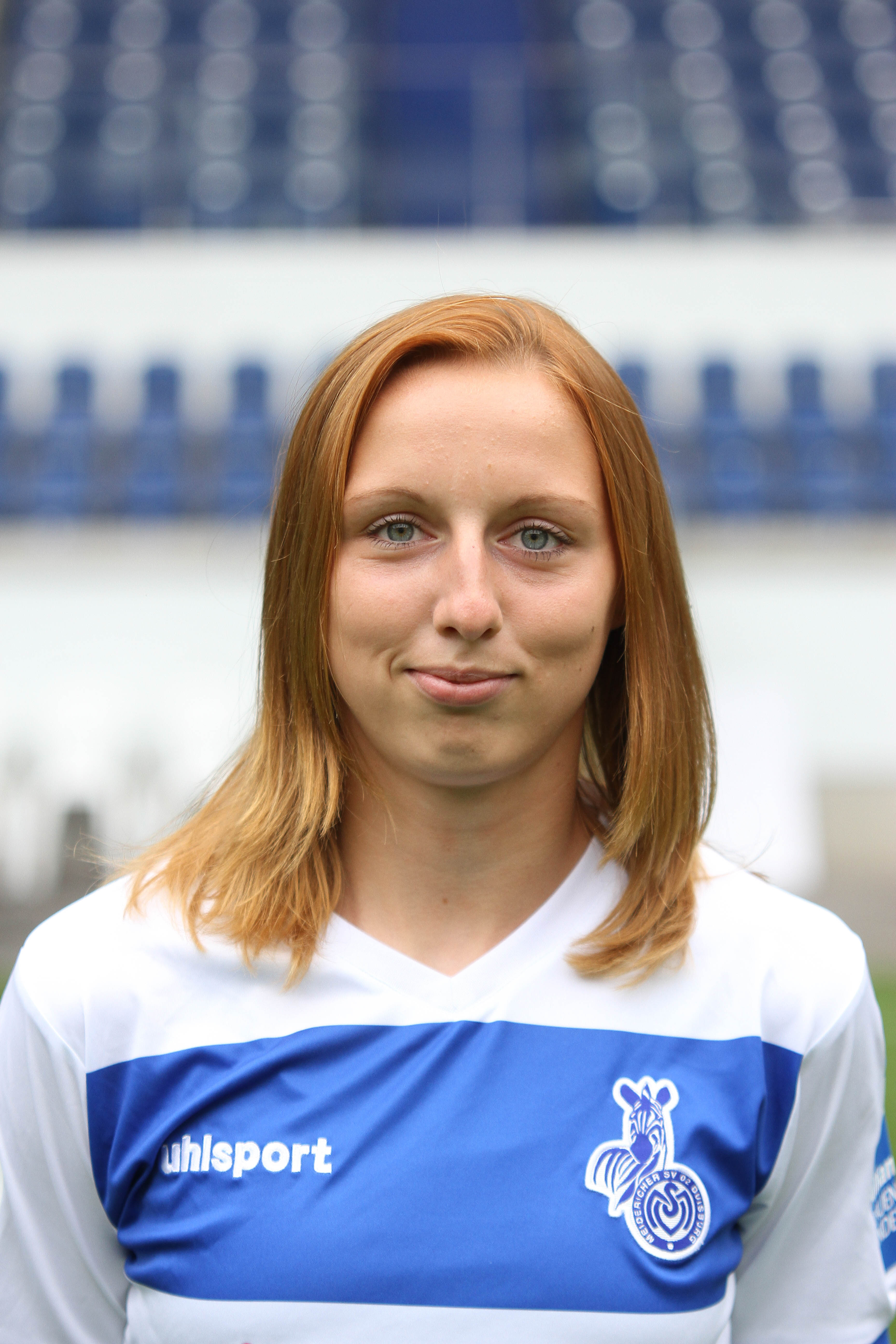 Alice Hellfeier (2014)